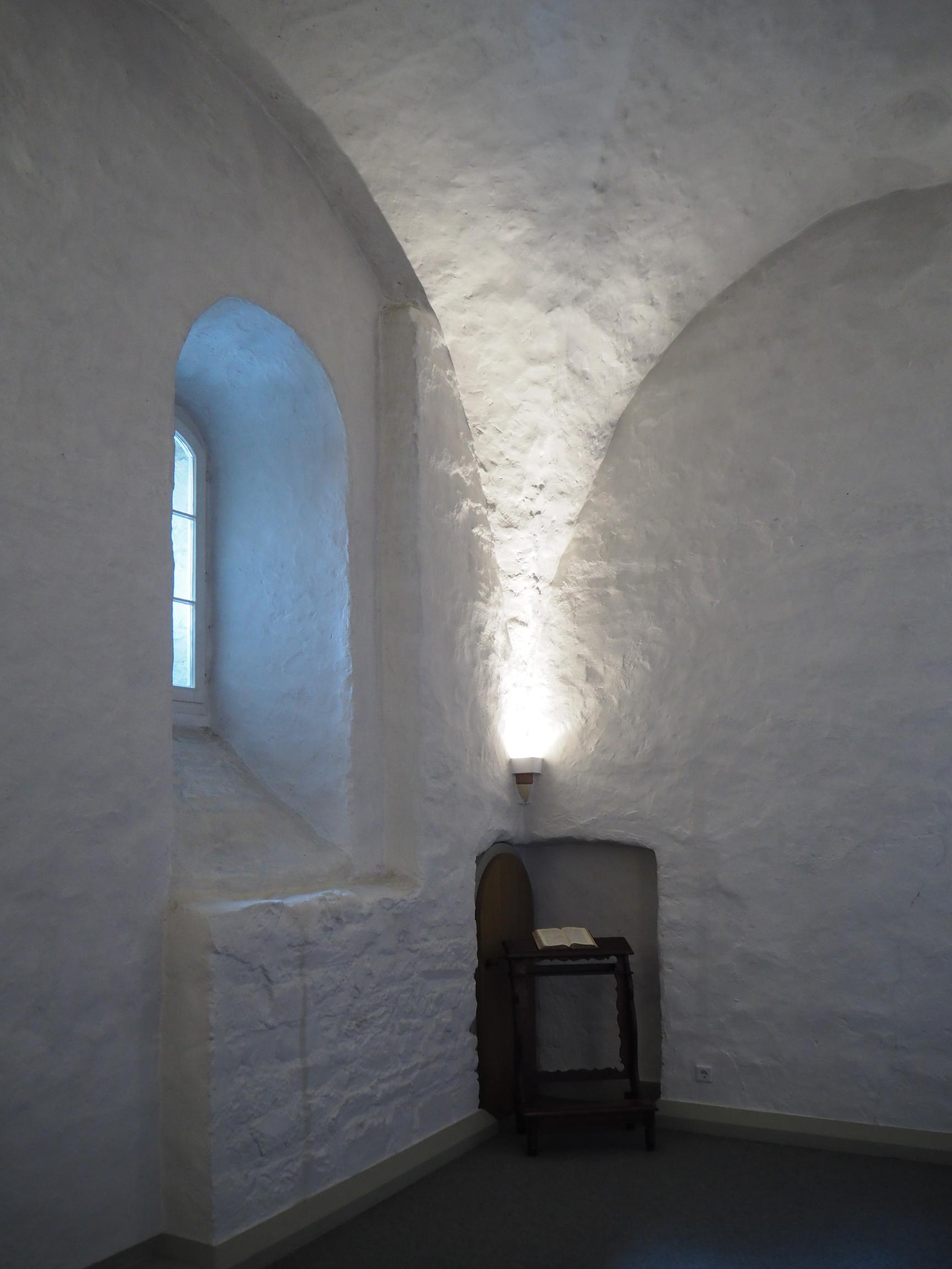 Wermelskirchen (NRW),Stadtkirche, Michaelskapelle, Foto: Juli 2015